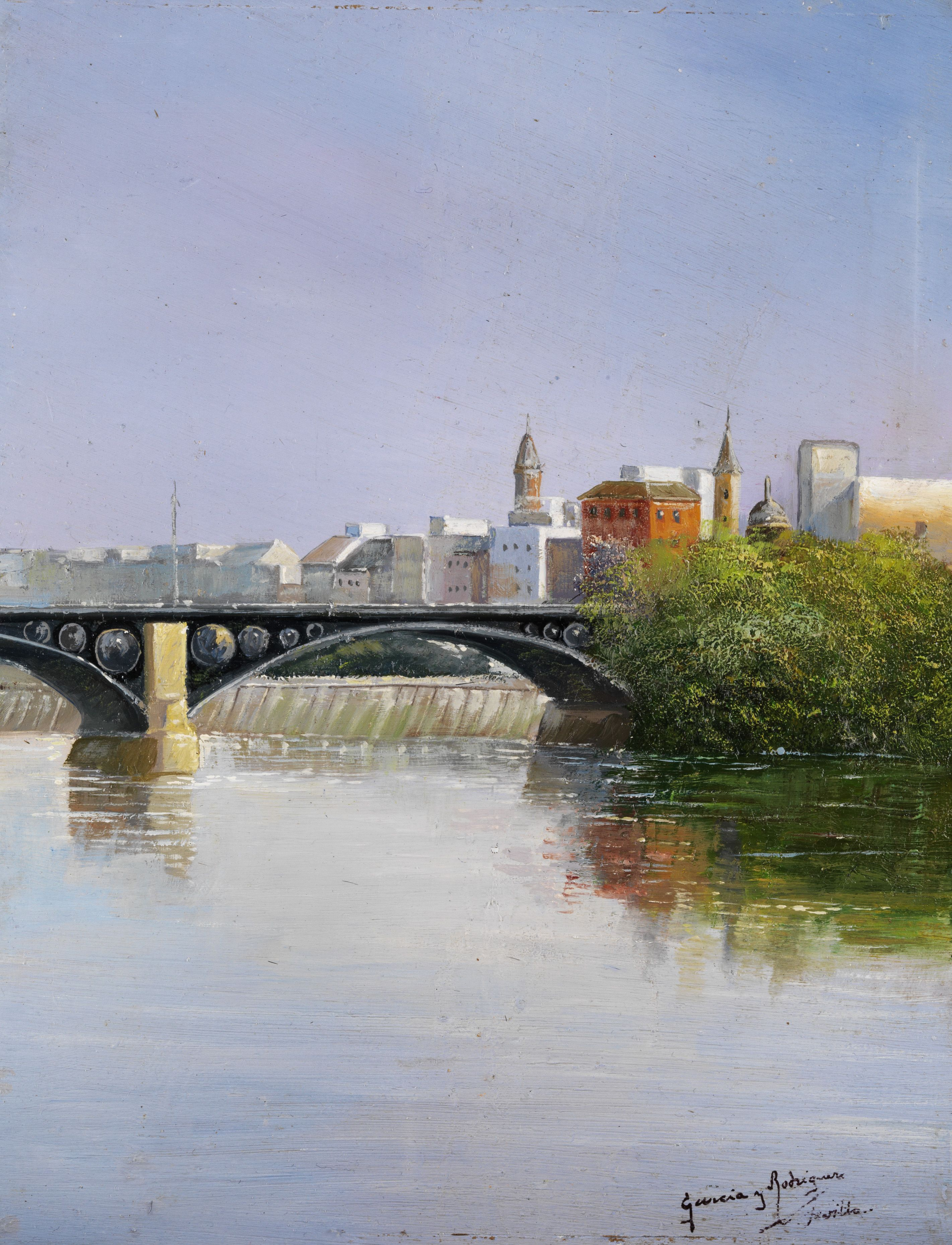 Brücke in Sevilla. Öl auf Holz. 25,3 x 19,4 cm. Rechts unten signiert und ortsbezeichnet "Sevilla".